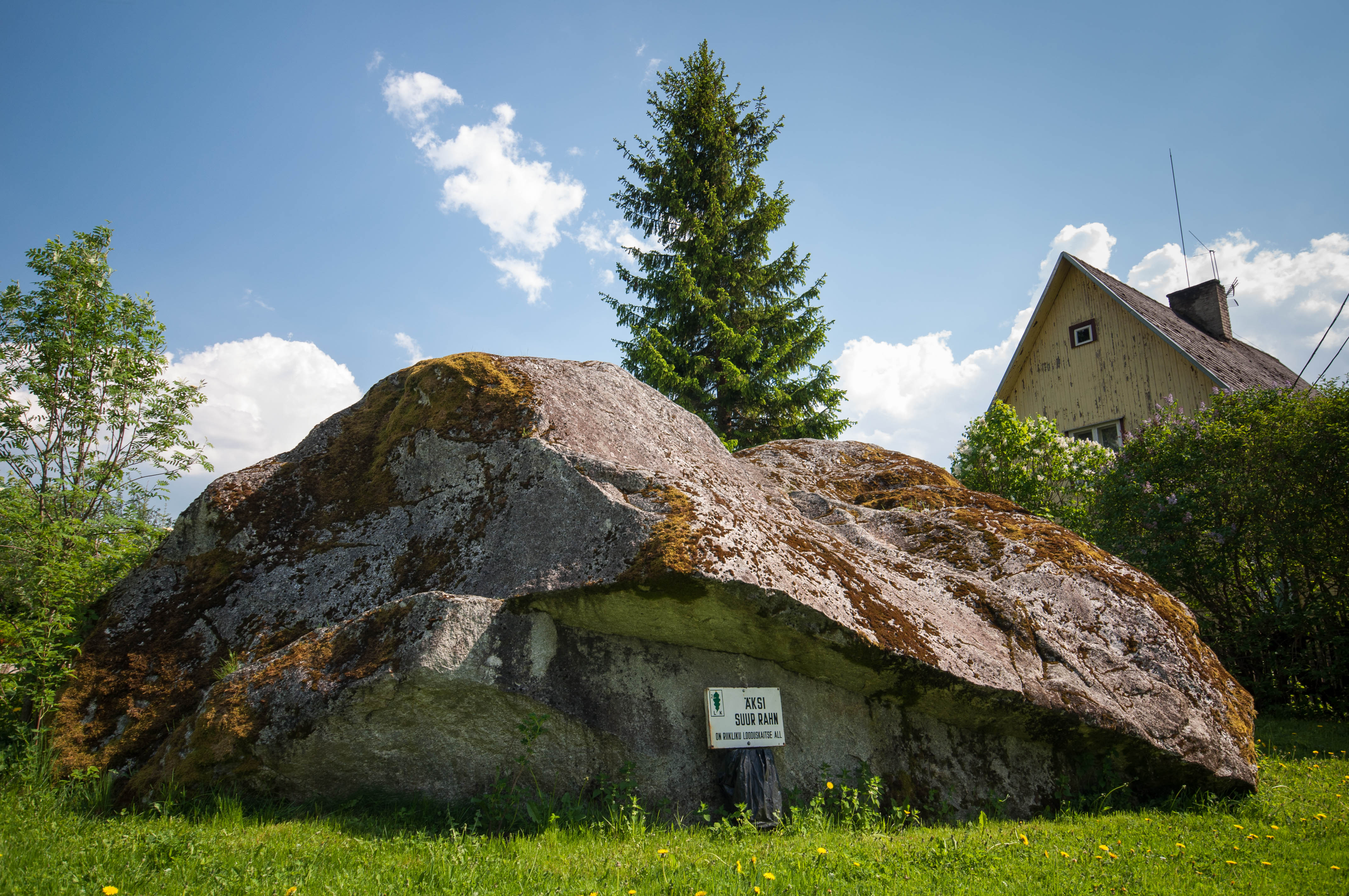 Äksi suur rahn; Äksi rändrahn